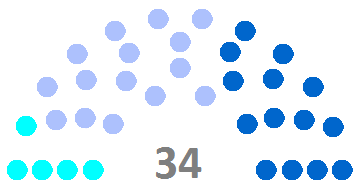 Répartition des sièges au conseil départemental de Haute-Savoie